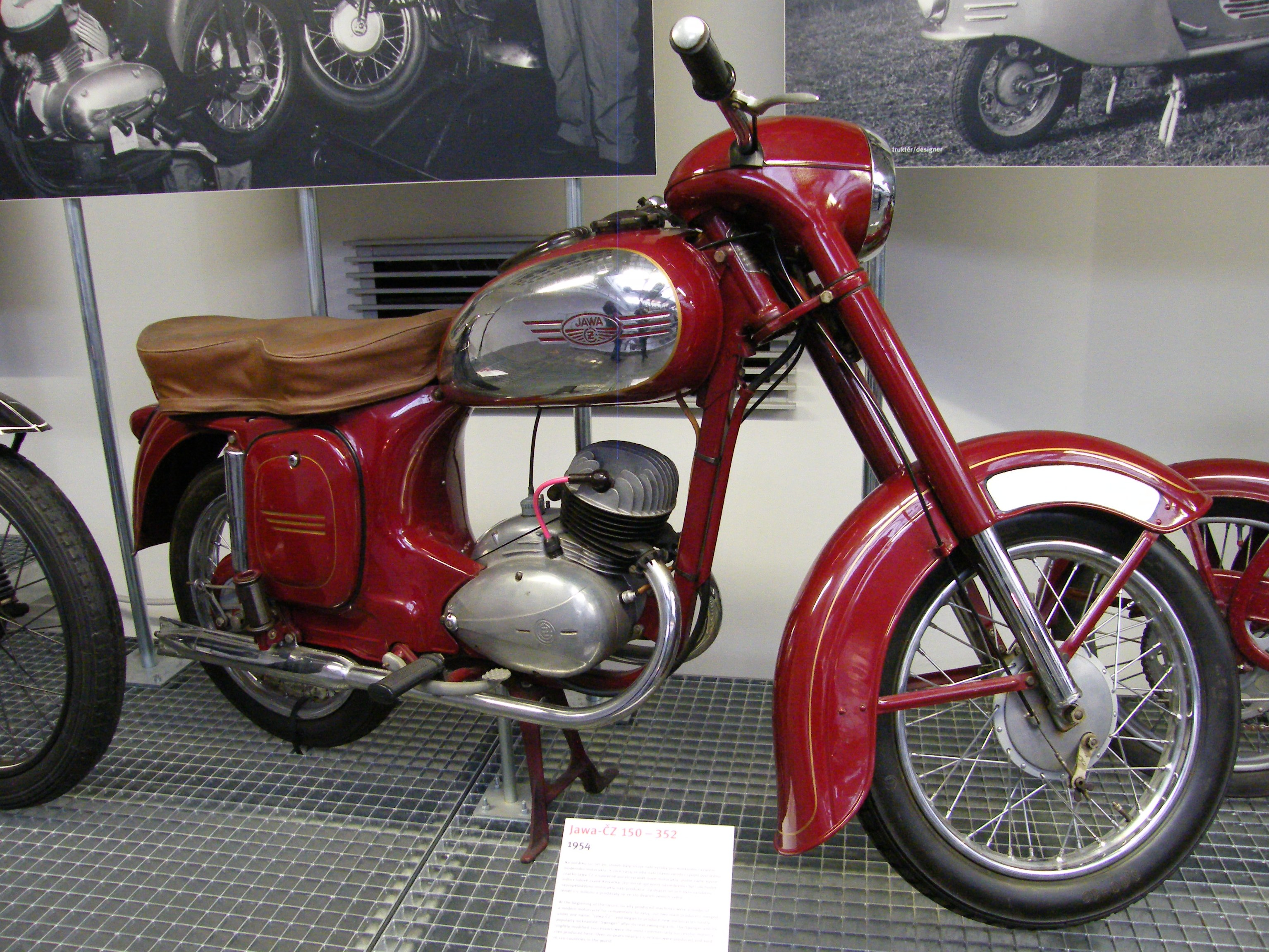 Jawa-ČZ 150/352